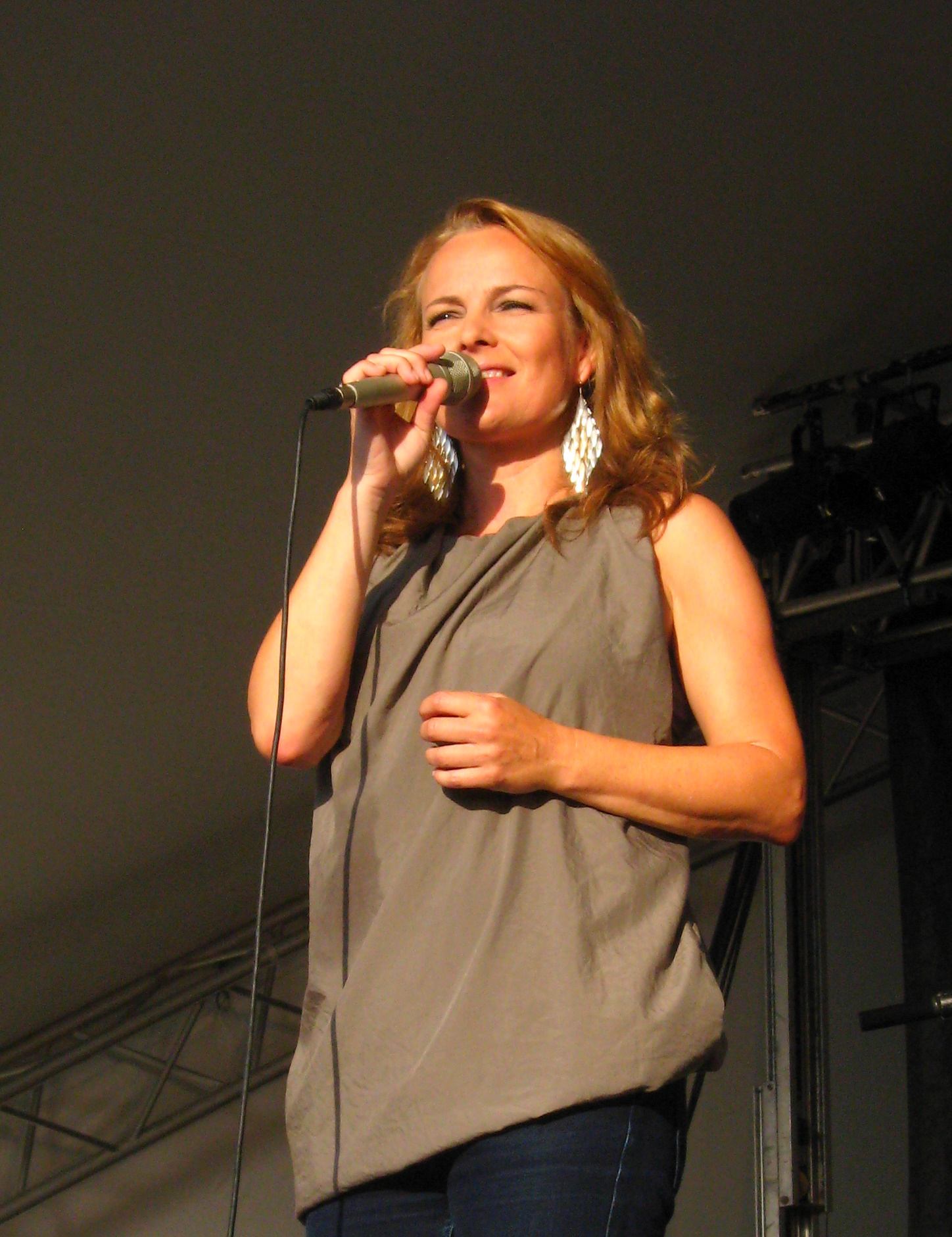 Søs Fenger i Aalborg, 2010 (The tall ships races Aalborg)